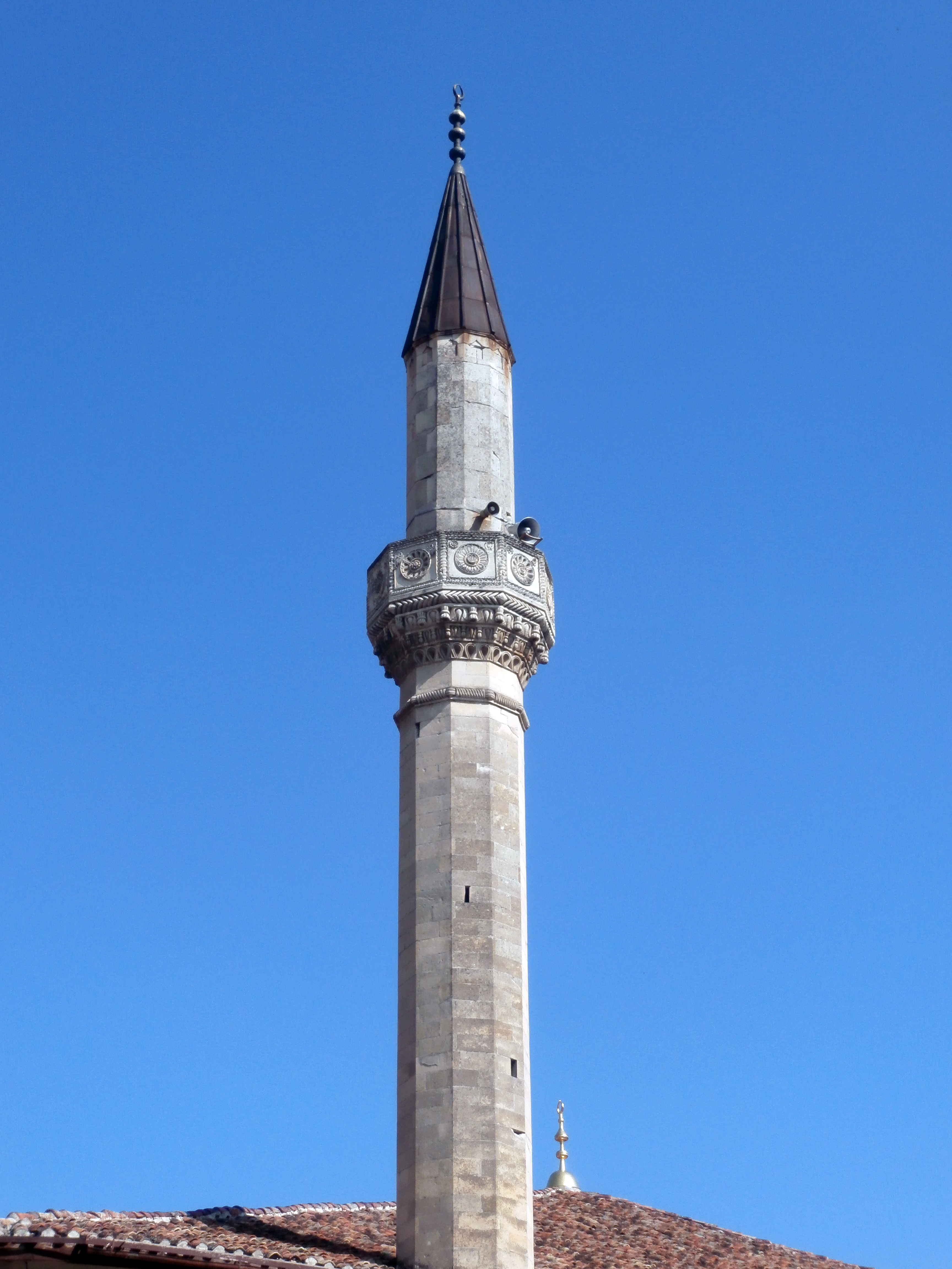 Минарет Хан-Джами в Бахчисарайском дворце